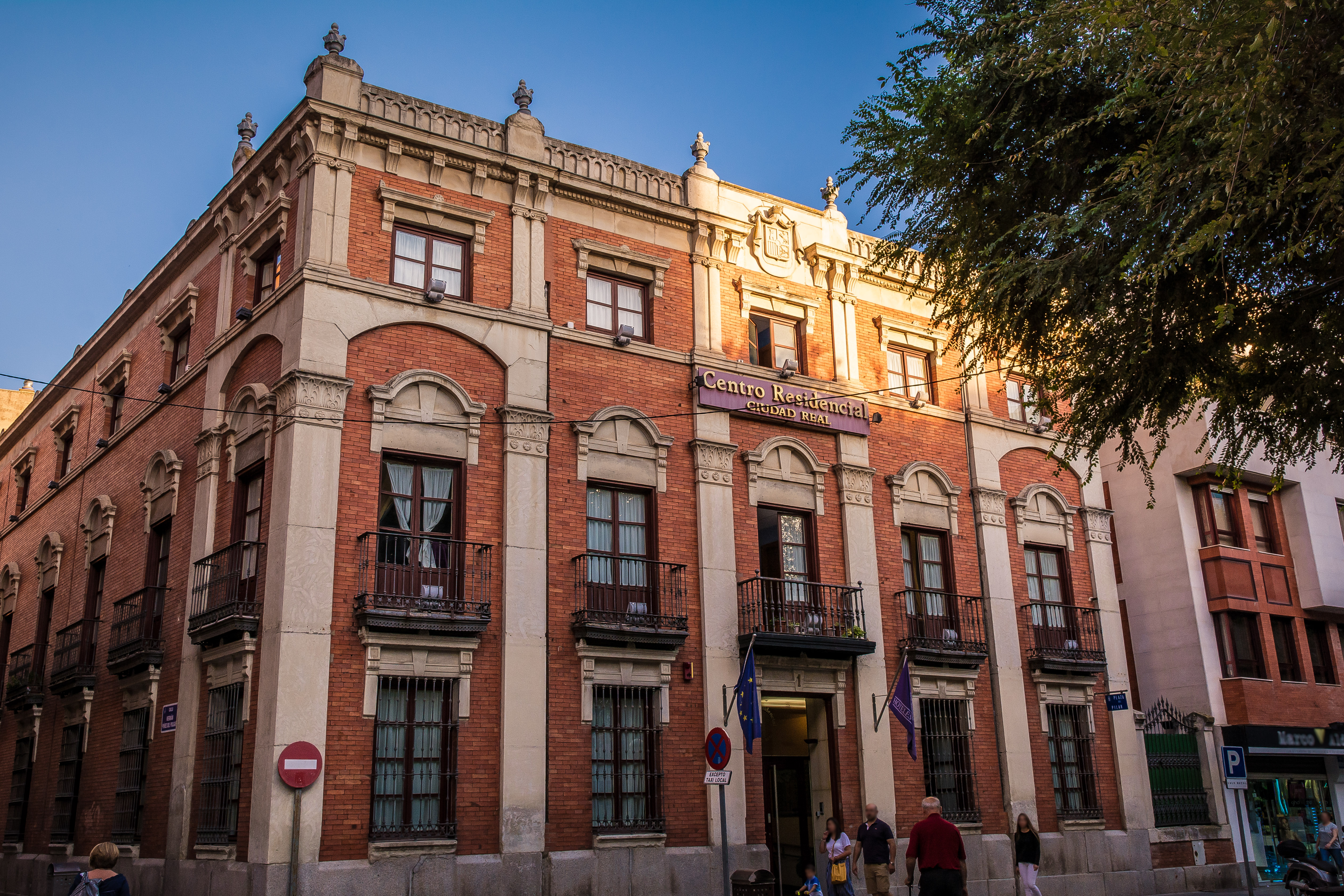 Situado en la Plaza del Pilar, monumento característico de dicha plaza y con mucha historia de la ciudad